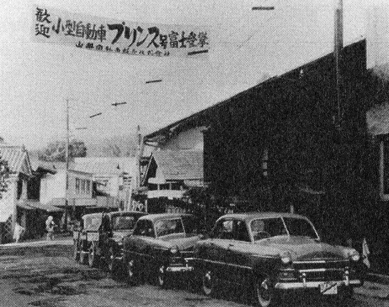 昭和27年8月、たま自動車（株）による、プリンス車の富士登山キャンペーンにて。